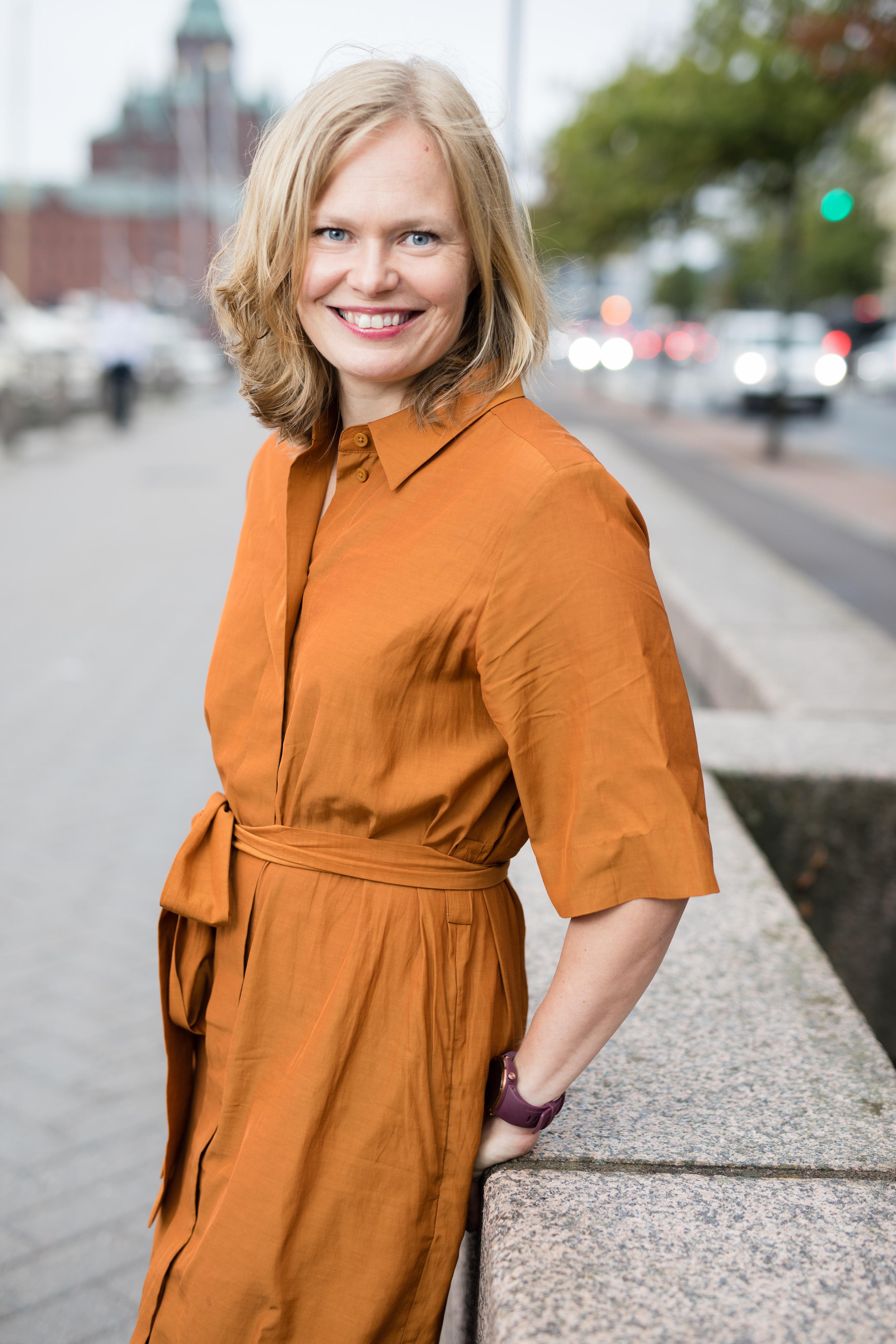 Tiede- ja kulttuuriministeri Hanna Kosonen virallisessa valokuvassa. Kuva Valtioneuvoston kuvapankista.